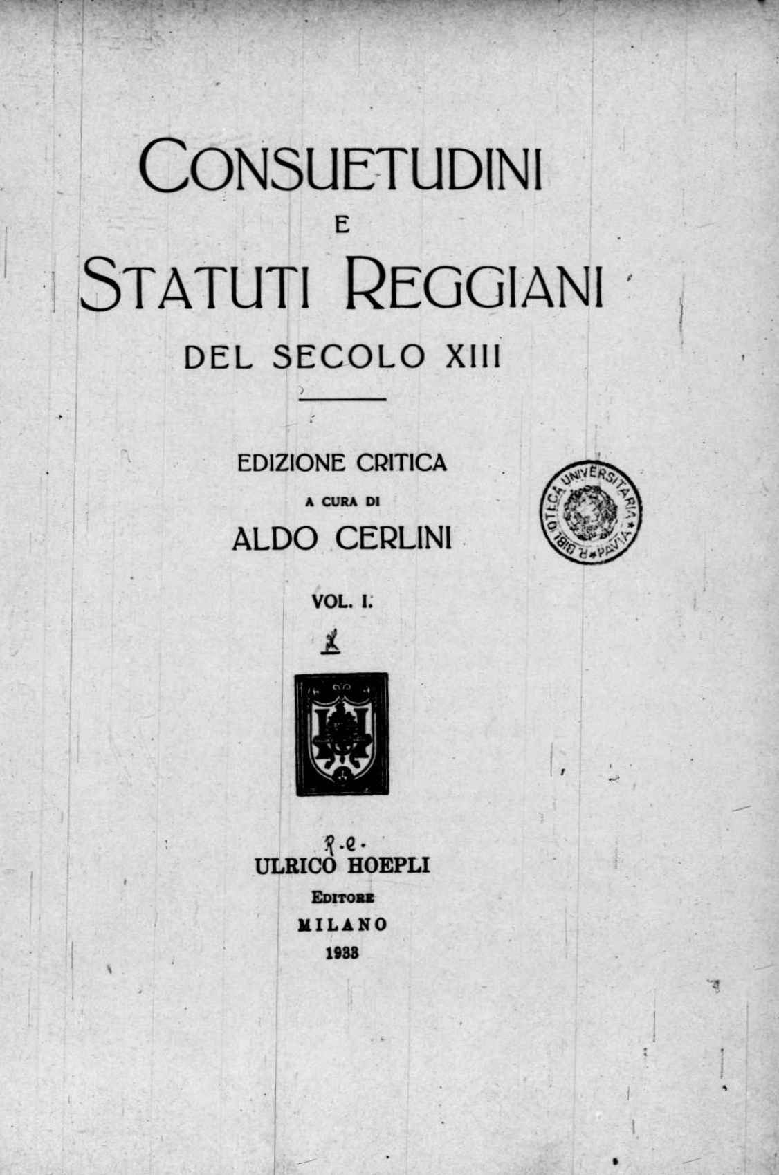 Frontespizio